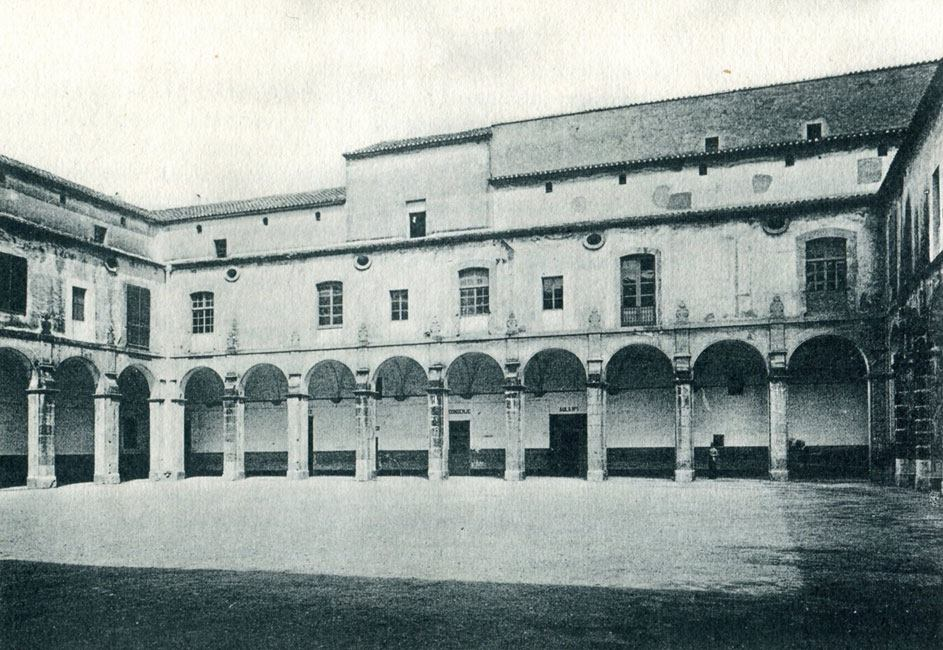 Claustre de l'antic convent de sant Francesc convertit en pati de l'institut de segon ensenyament, a Reus